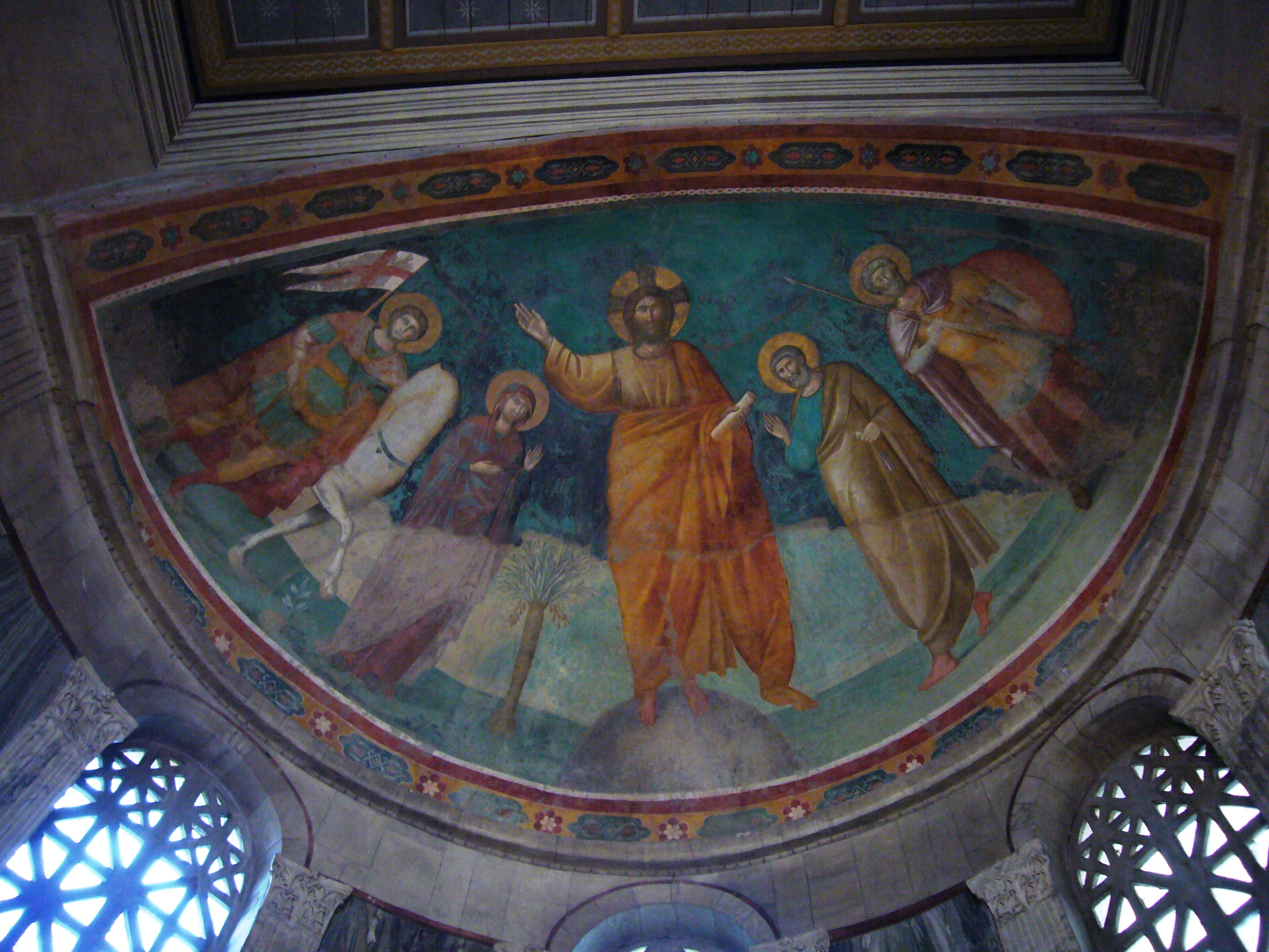 Roma, san Giorgio al Velabro: affresco dell'abside.